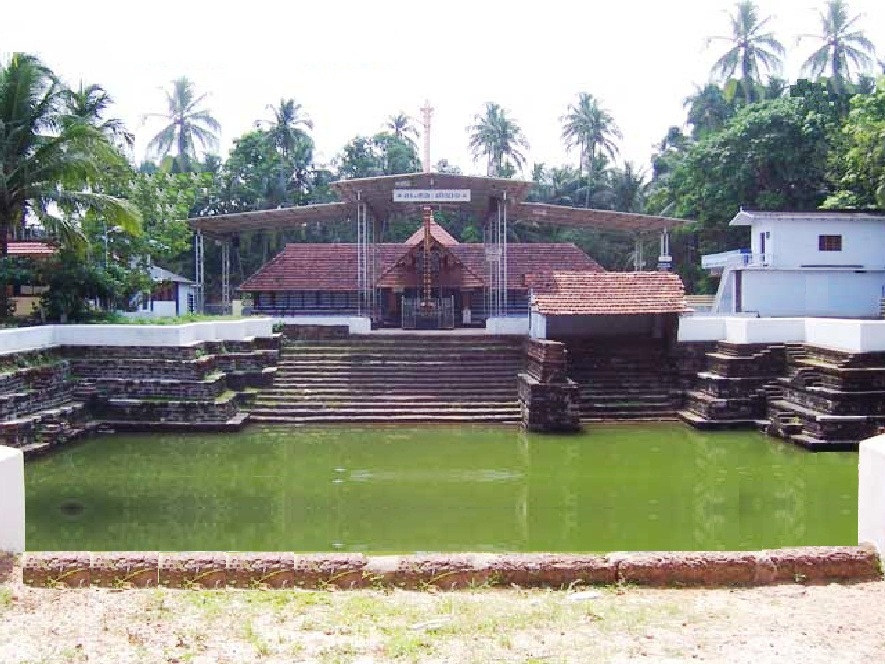 കാഞ്ഞിലശേരി മഹാദേവക്ഷേത്രം